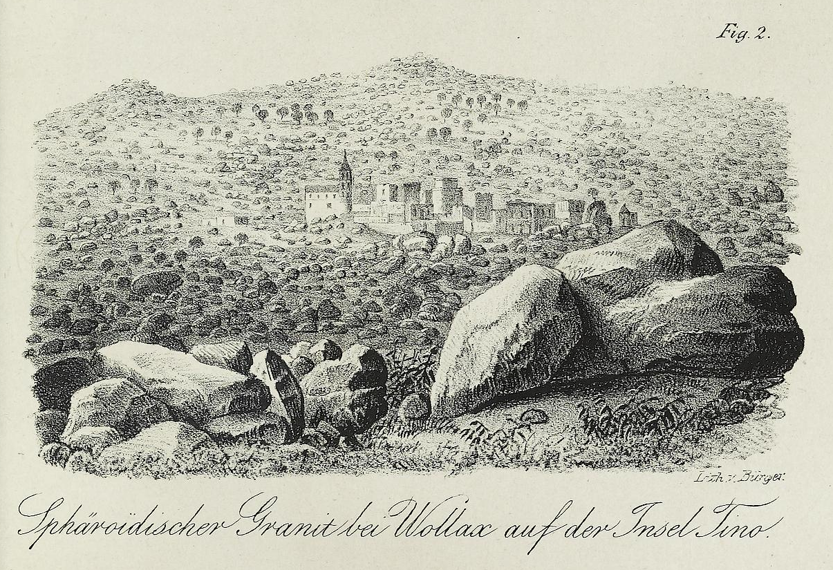 H Bωλάξ σε χαλκογραφία του 1836 (από βιβλίο του Karl Gustav Fiedler)